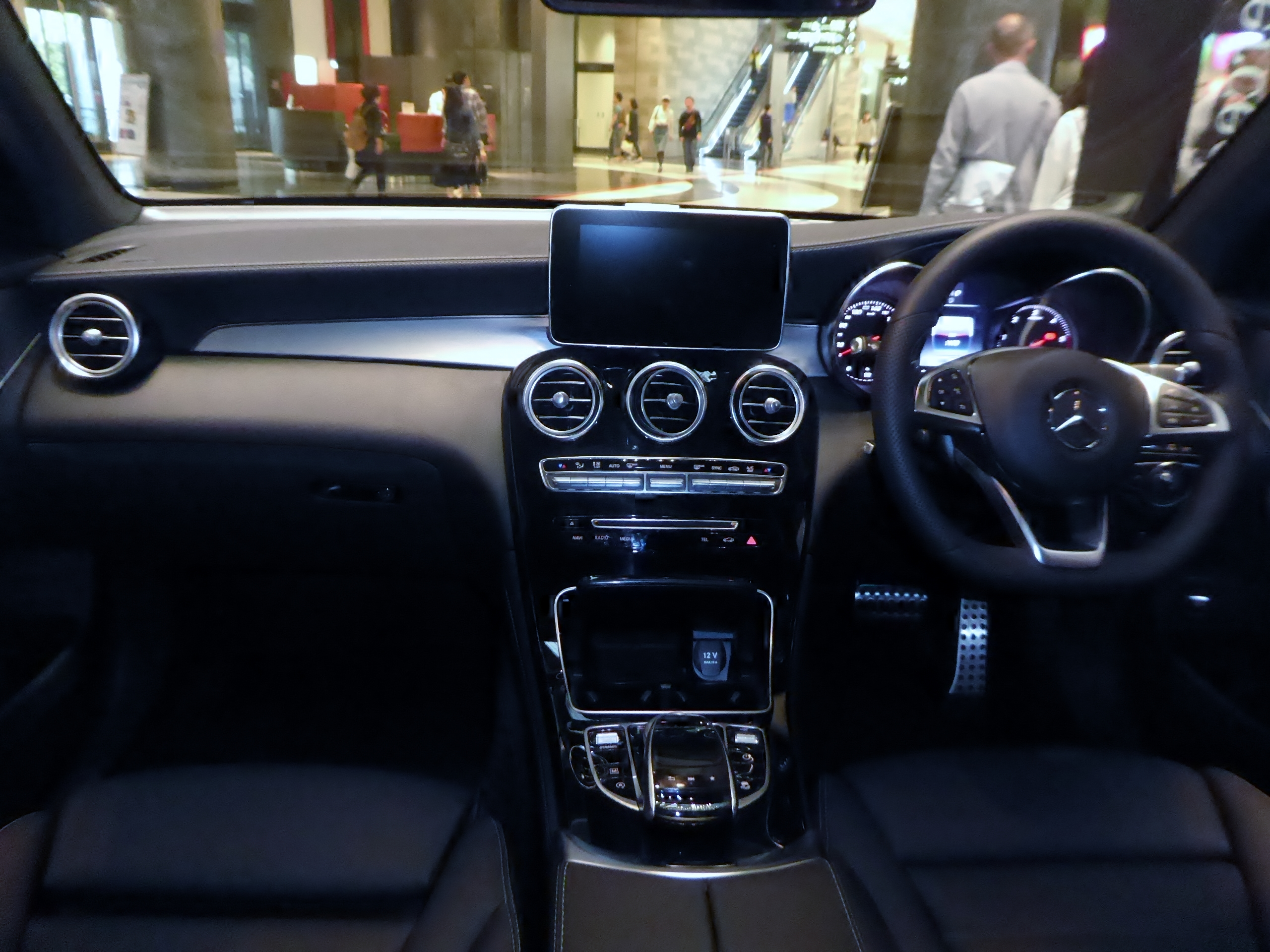 C253系メルセデス・ベンツ・GLC220d 4MATICクーペスポーツのインテリアを撮影。